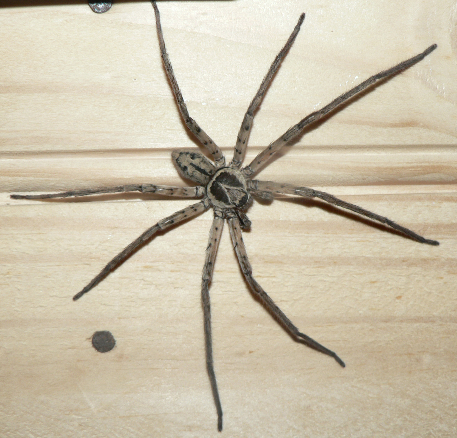 Heteropoda sp.